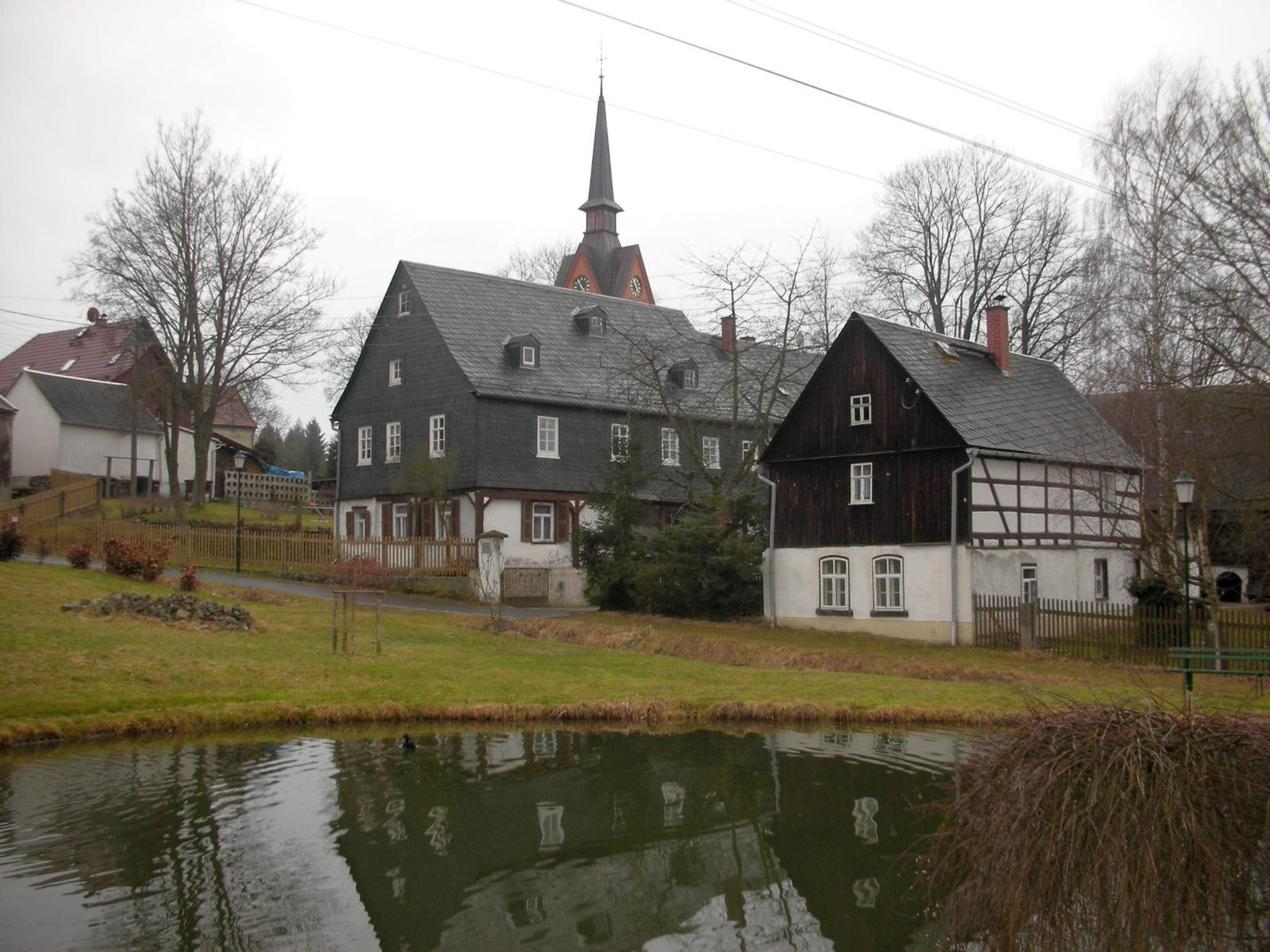 Umgebung Pfarrhaus in Marieney (Geburtshaus von Adam Friedrich Zürner), hinten Kirche